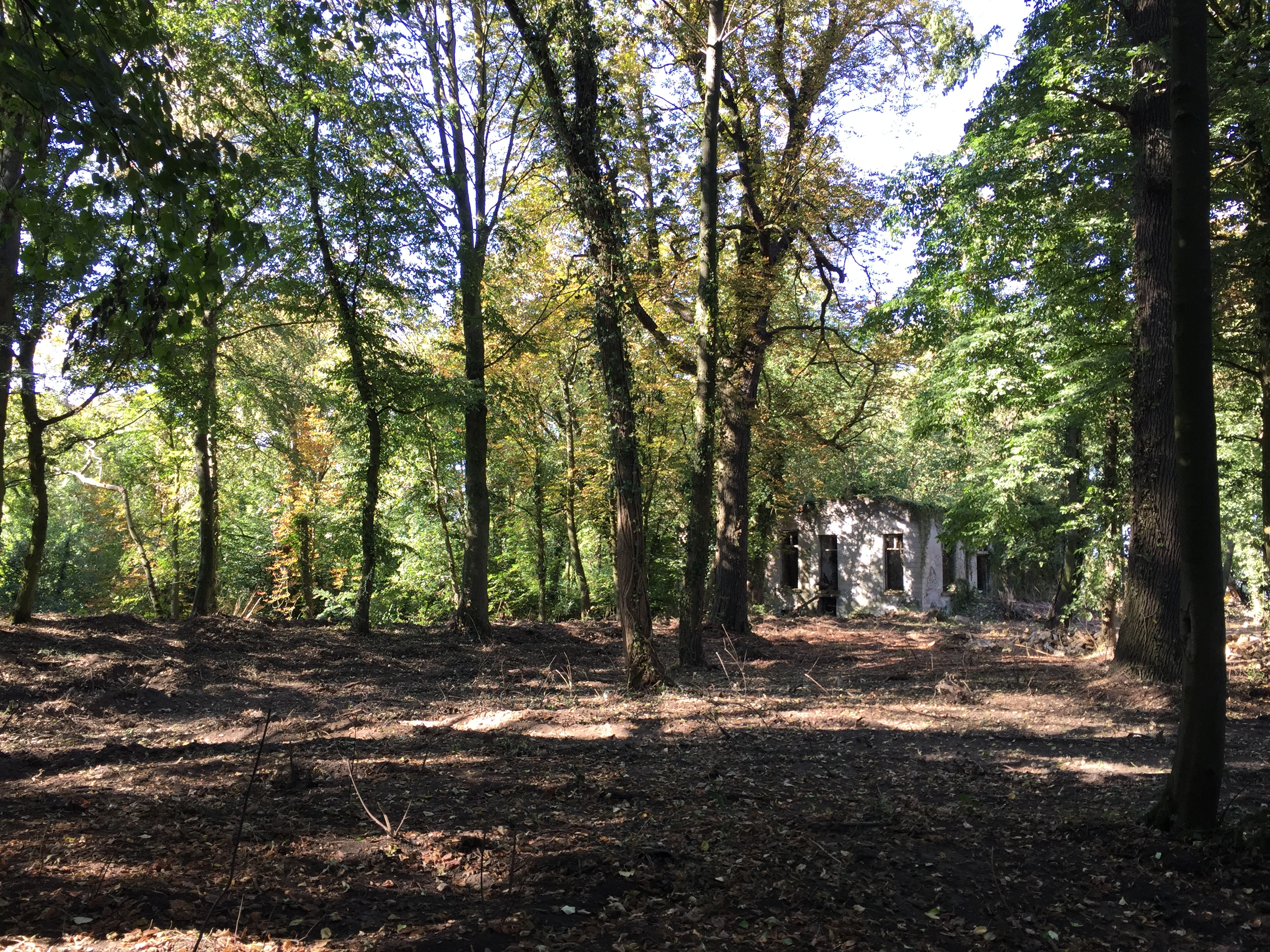 Getrokken in augustus 2018, tijdens een wandeltocht.